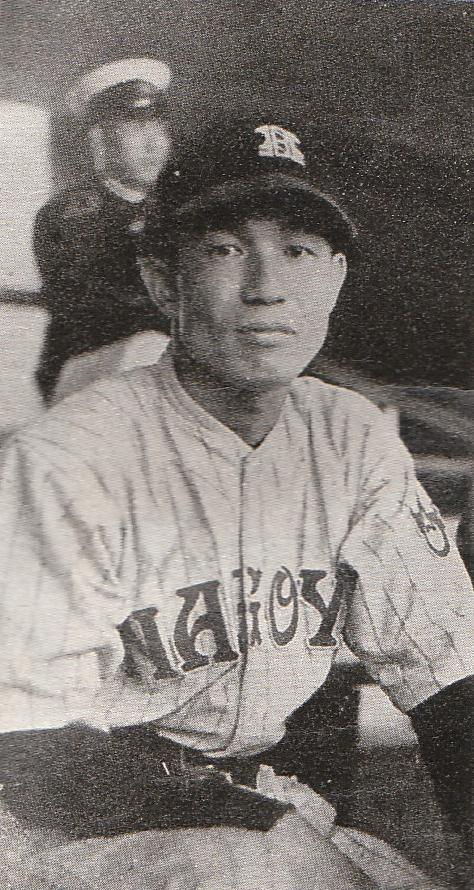 1938年ごろの桝嘉一選手。